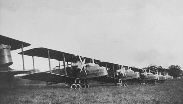 Handley Page Hyderabad